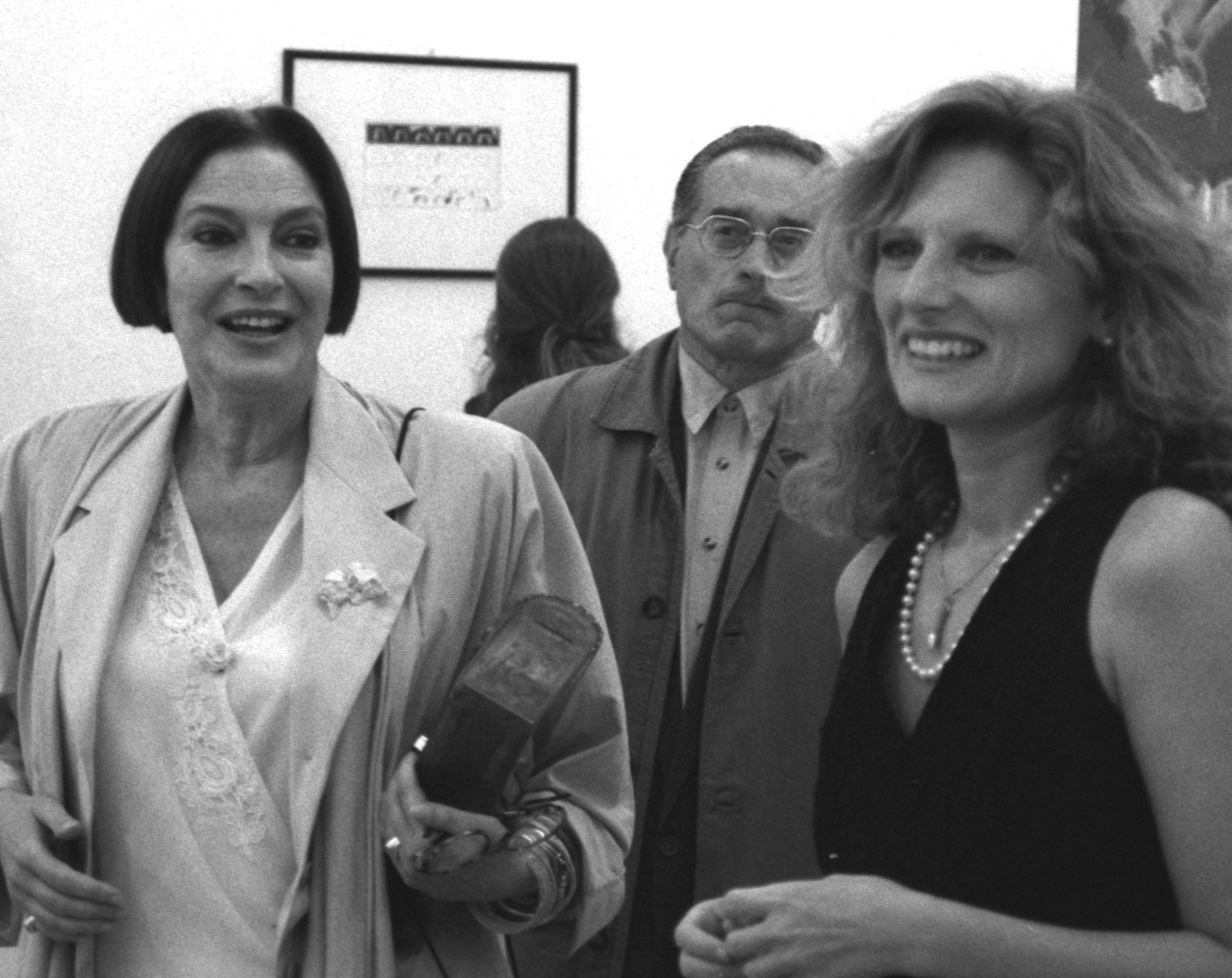 Luciano Inga Pin con Lea Vergine e Emi Fontana